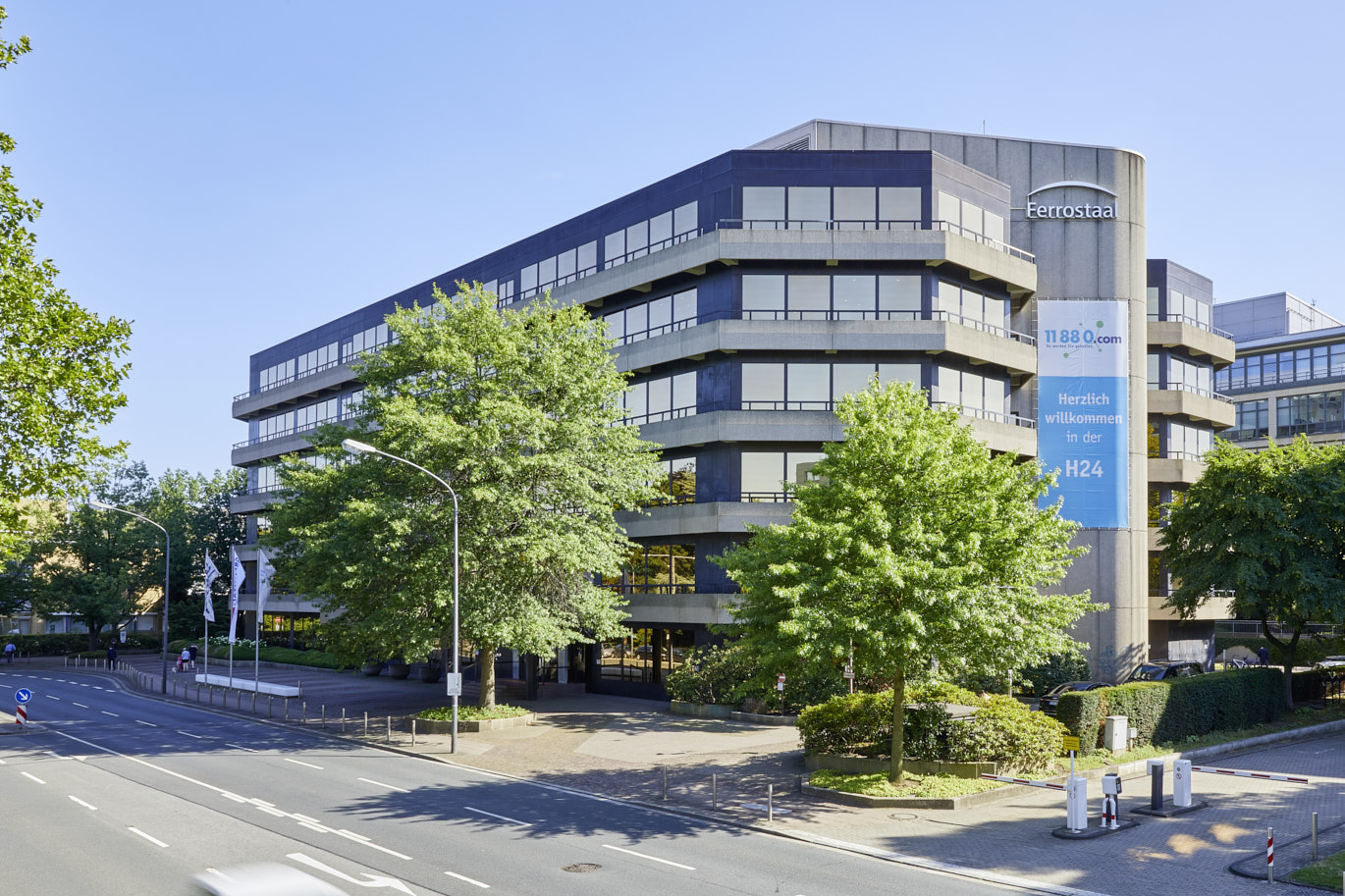 Das ist das Bürogebäude, in dem die 118880 Internet Services AG ihren Sitz hat. Es befindet sich in der Hohenzollernstrasse 24 in 45128 Essen in der Nähe des Essener Hauptbahnhofs.